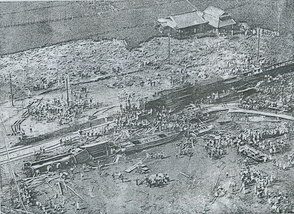 山陽本線安芸中野駅 - 海田市駅間で発生した特急列車脱線事故の空撮写真。手前が転覆列車、中央から右手に停車しているのが救援列車、地面の白い部分は水害で荒らされた土地。